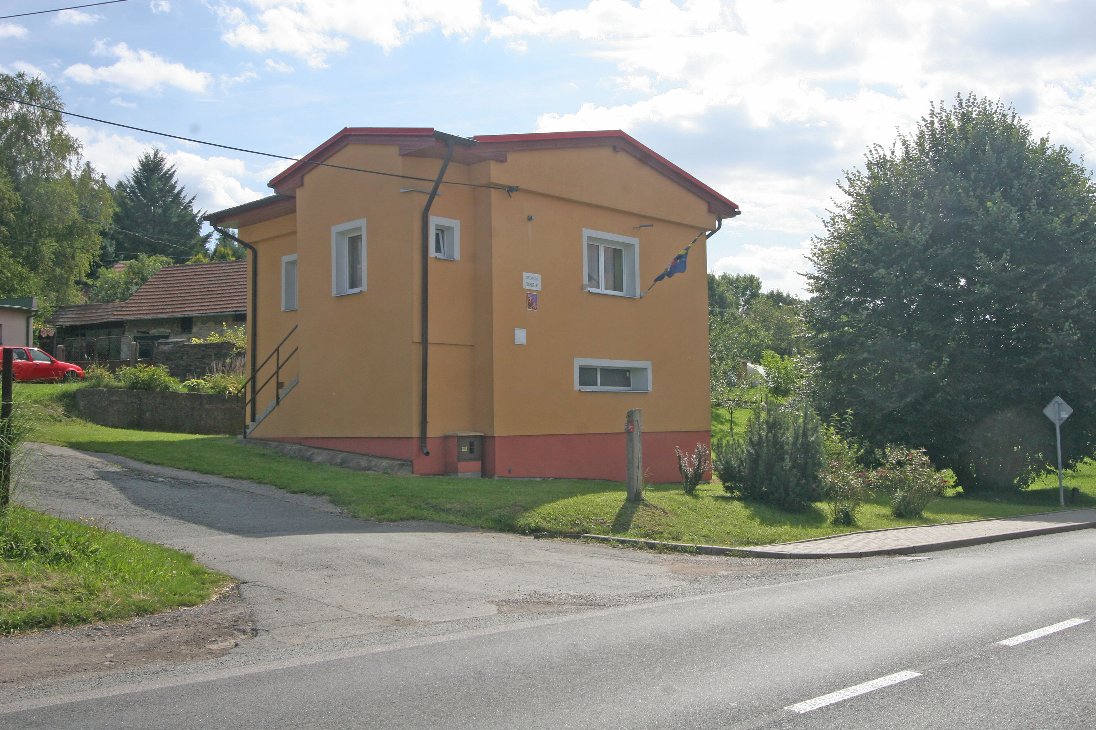 Podhořany obecní úřad